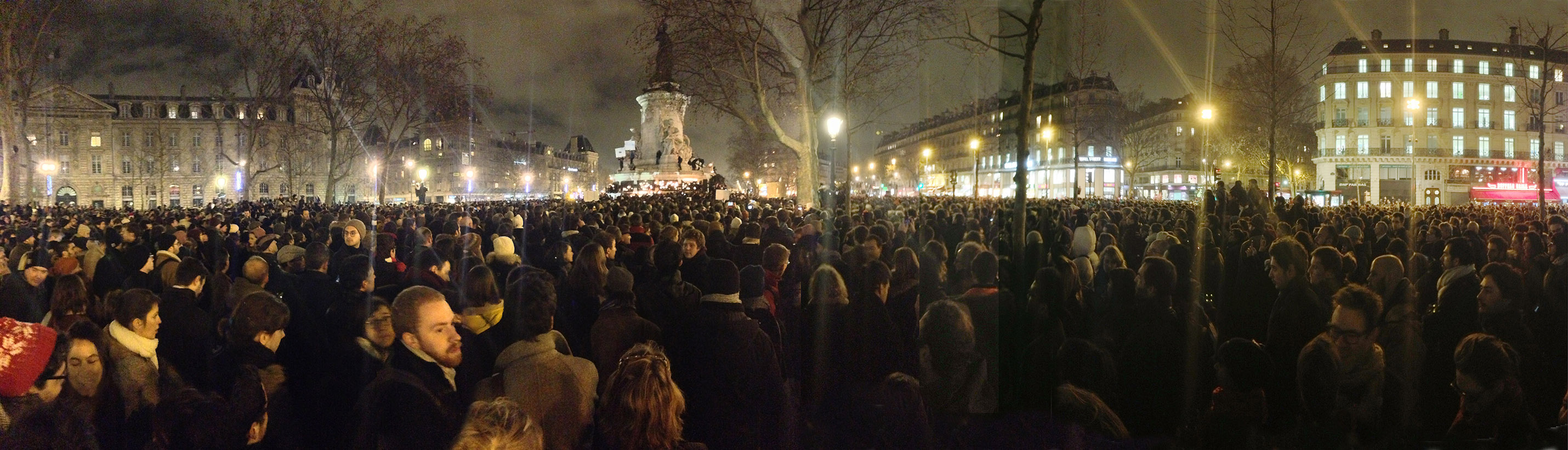 Place de la République, 18h50, une foule silencieuse